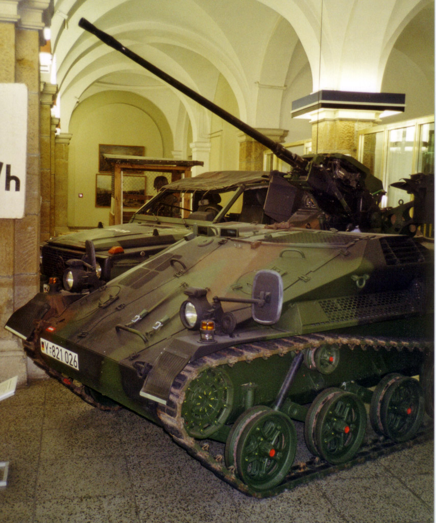 Wiesel, ausgestellt Militärhistorischen Museum der Bundeswehr in Dresden